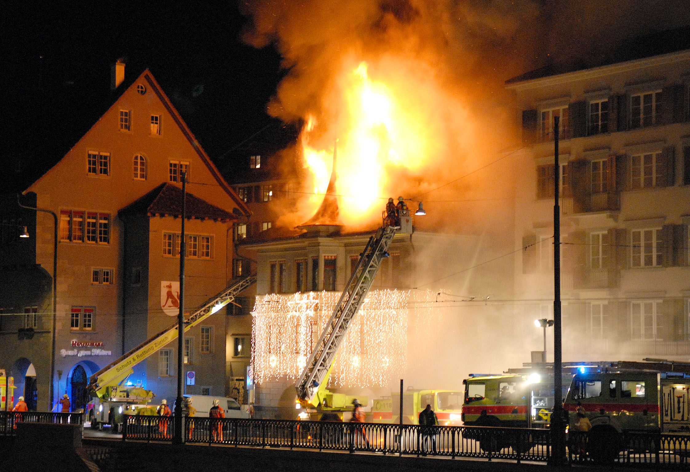 Zunfthaus zur Zimmerleuten, Brand am 14./15. November 2007